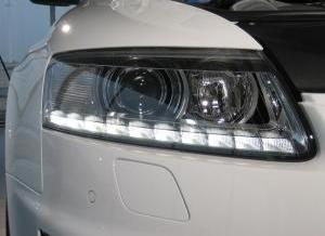 DEL de l'Audi RS6 Avant